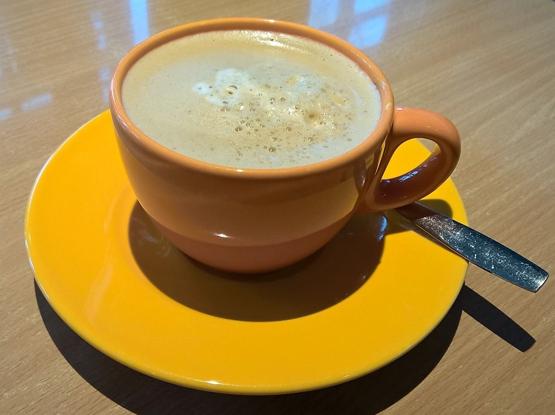 Eine Tasse Nescafé Instantkaffee, nach Zugabe von etwas Milch.Hier als gastronomisches Heißgetränk in einer Bahnhofs-Bäckerei, zubereitet mit einem Kaffeevollautomaten von Nestlé Professional, Typ Nescafé Alegria.